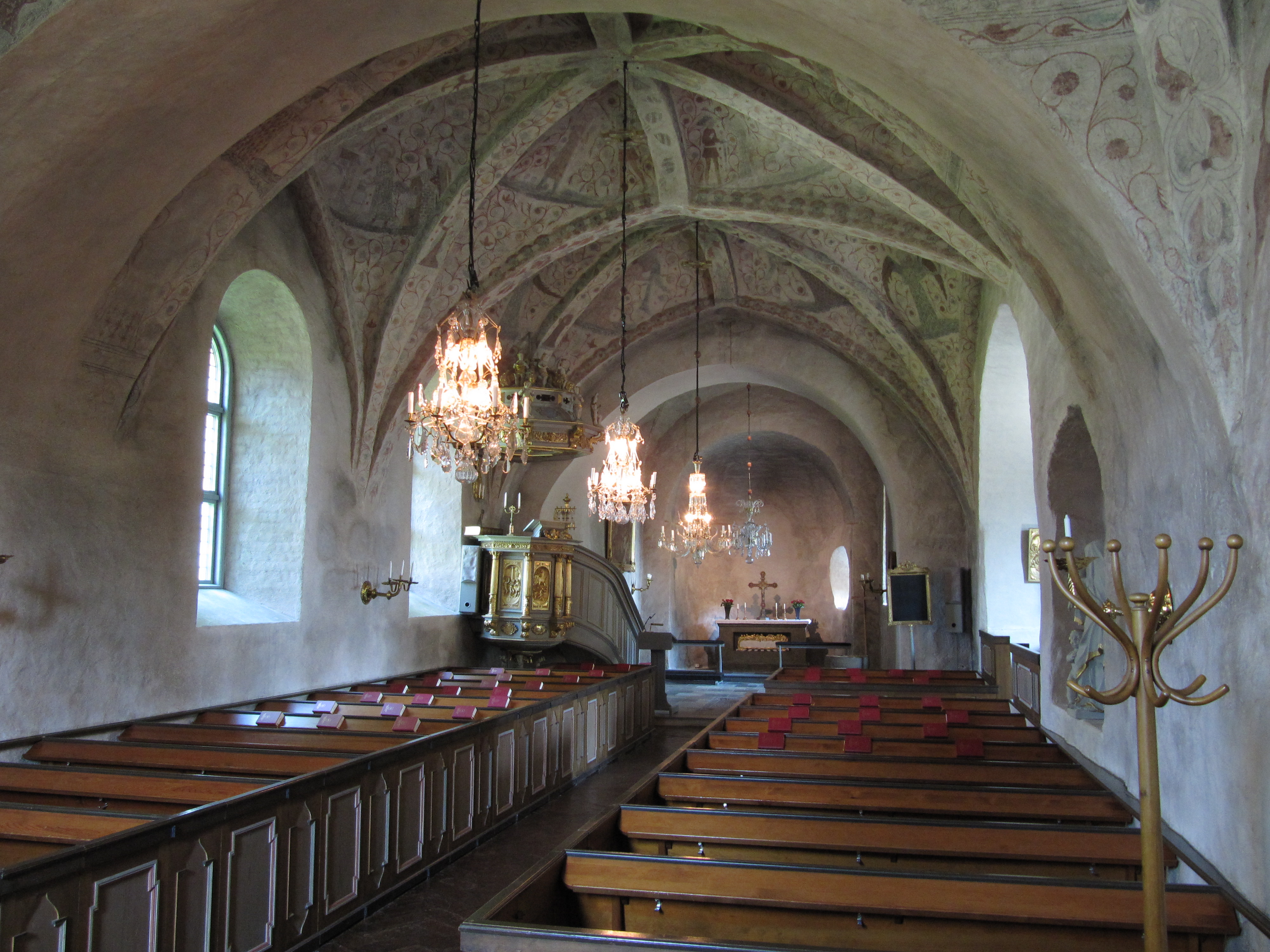 Kyrkorum i Norrsunda kyrka